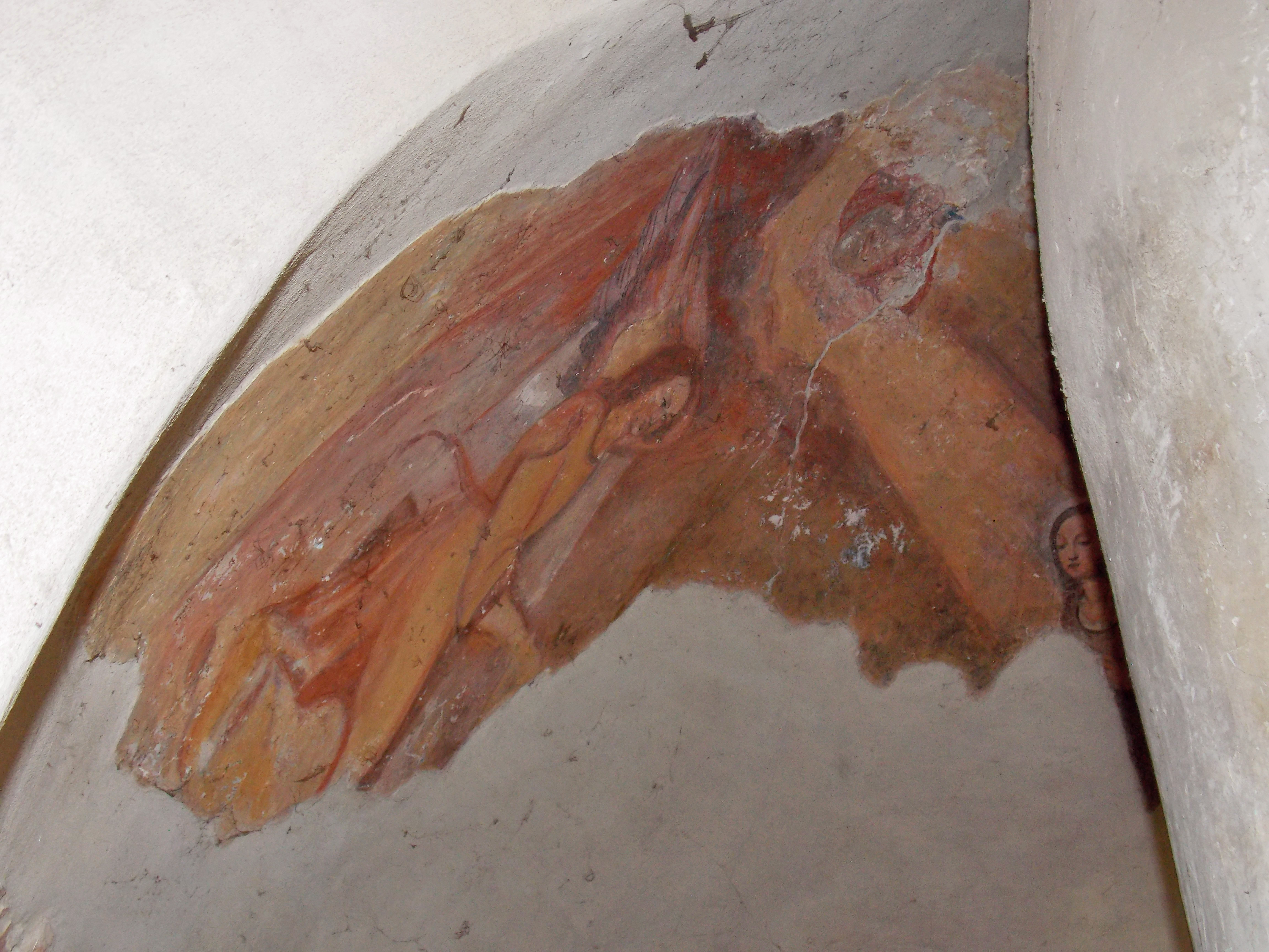 La chiesa dell'Annunziatella ad Arpaia